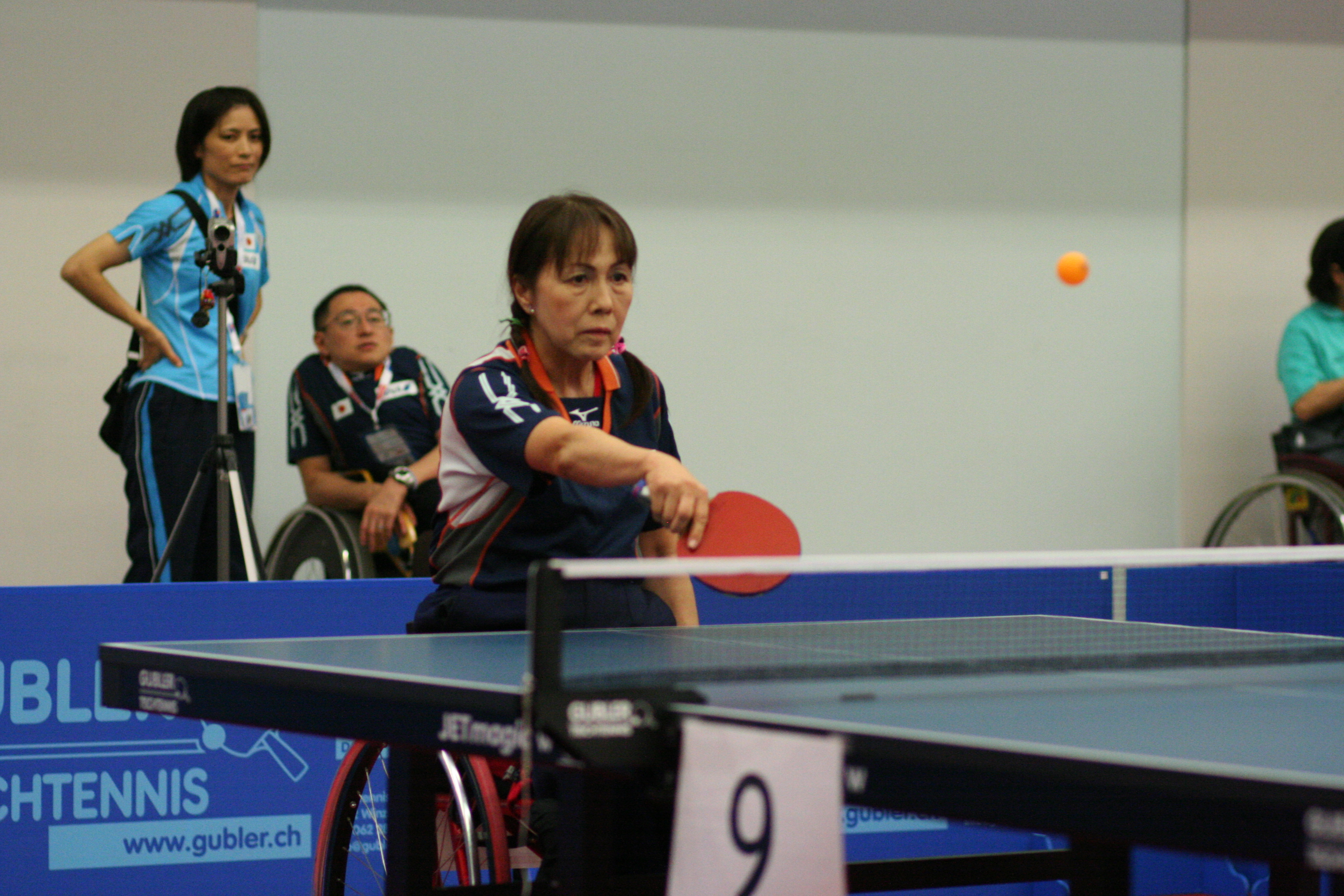 Kimmie Besho (Japan)